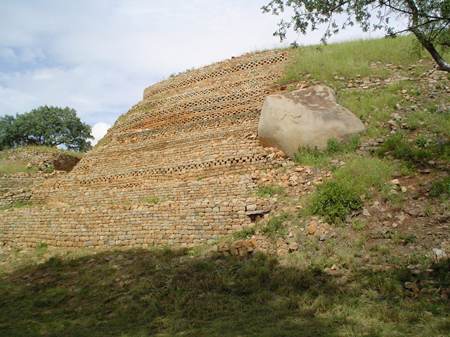 Khami ruins (wall)